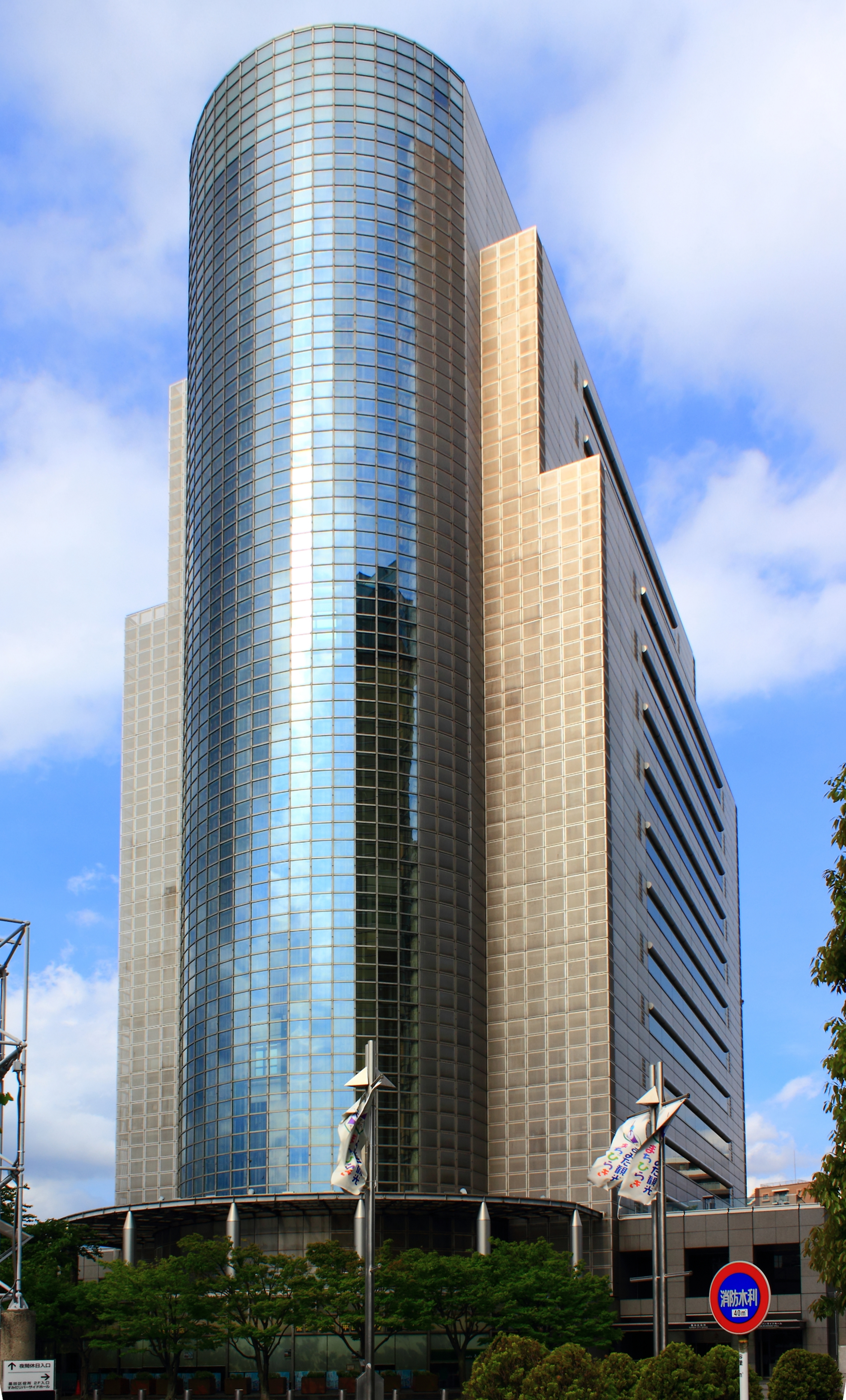 墨田区役所